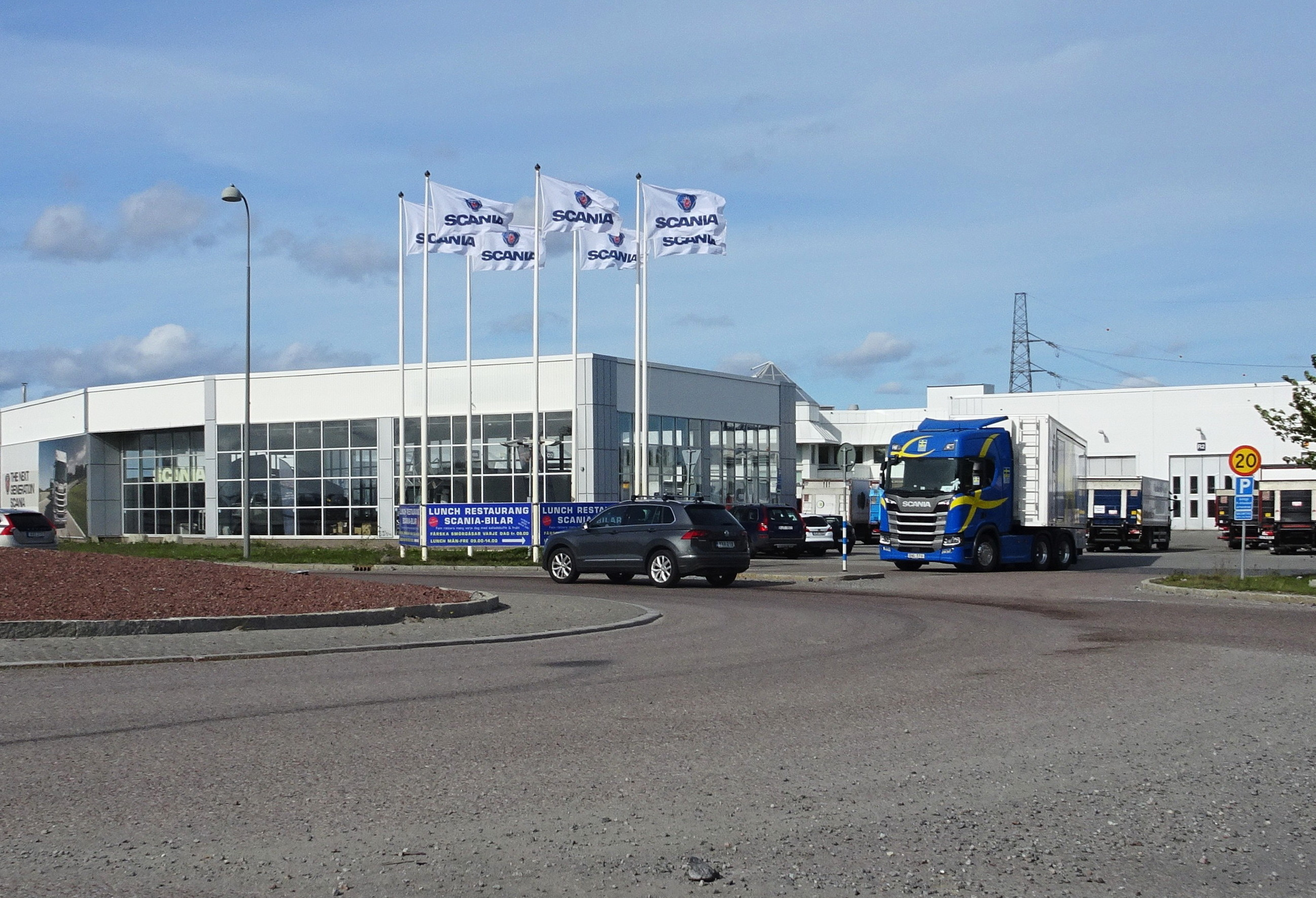 Scanias lastvagnscentrum, Kungens kurva